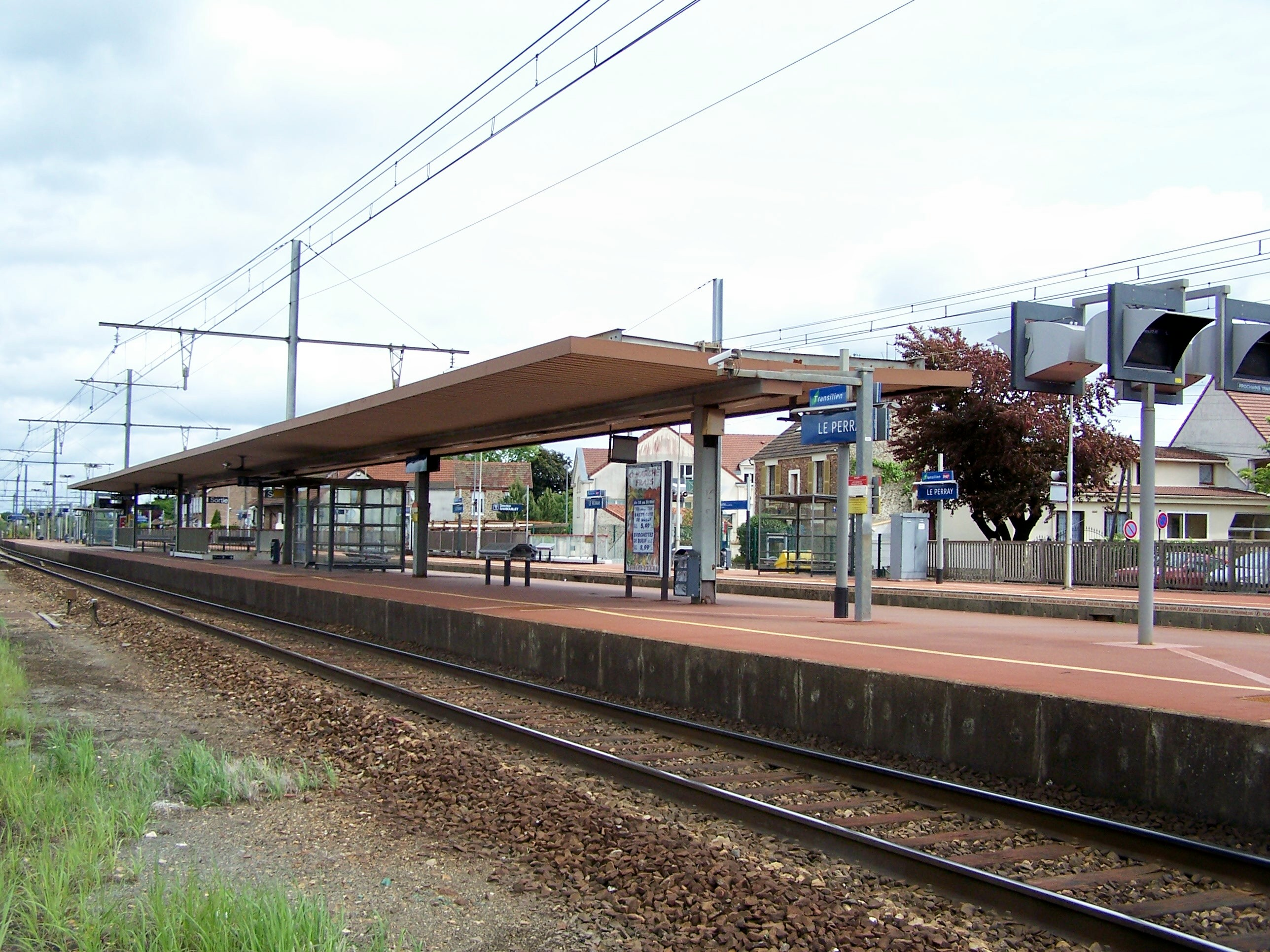 Gare du Perray-en-Yvelines, Yvelines, France